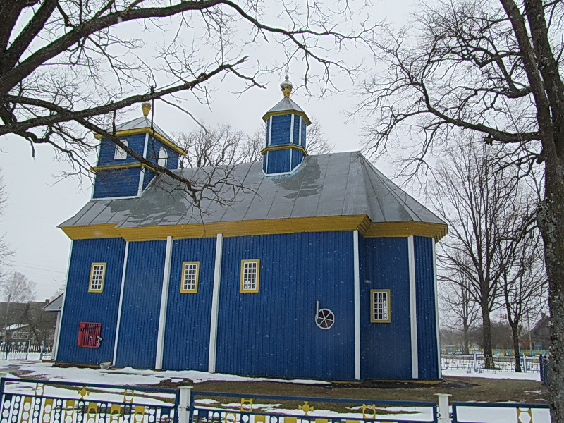 Пишите здесь